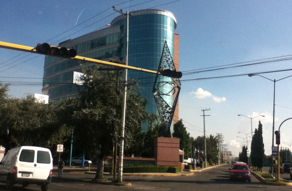 Torre y Monumento